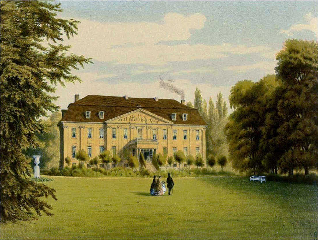 Schloss Friedrichsfelde, Lithografie aus dem 19. Jahrhundert